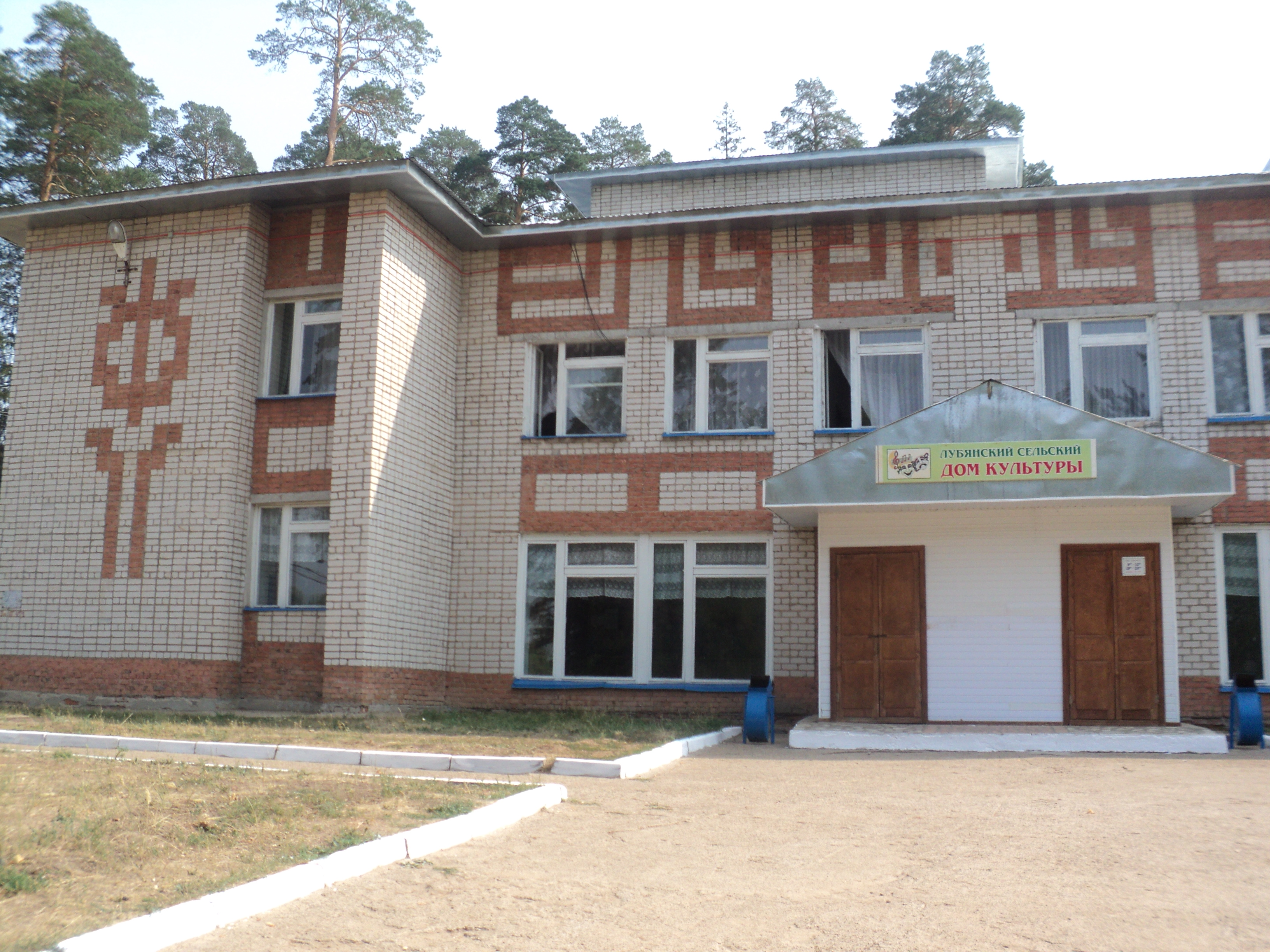 Дом культуры